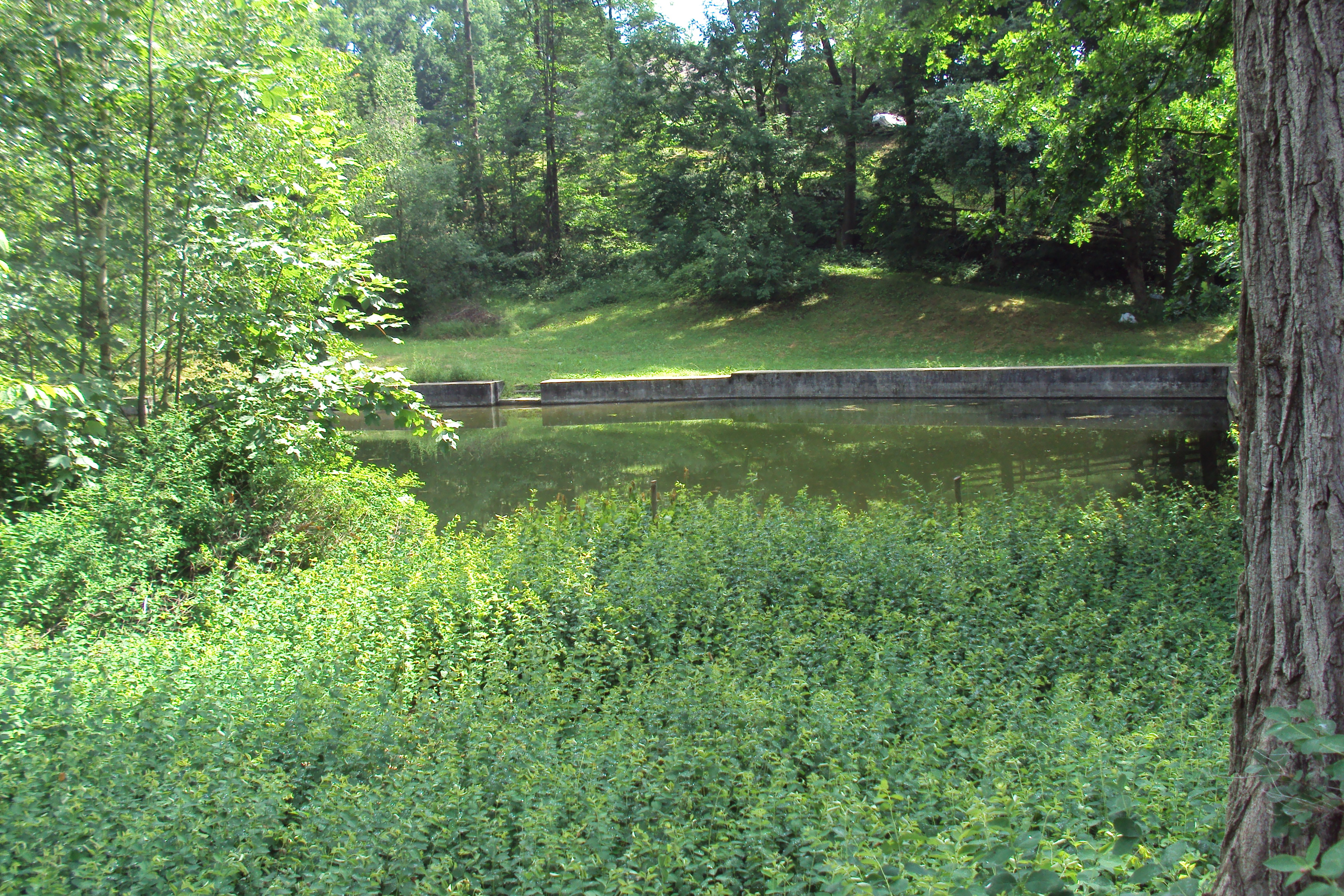 Požární nádrž v horní části obce Slunečná